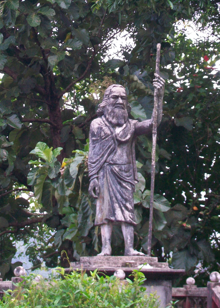 ഇടുക്കി അണക്കെട്ടിന്റെ മാർഗദ്ദർശിയായ കൊലുമ്പൻ എന്ന ആദിവാസിയുടെ പ്രതിമ